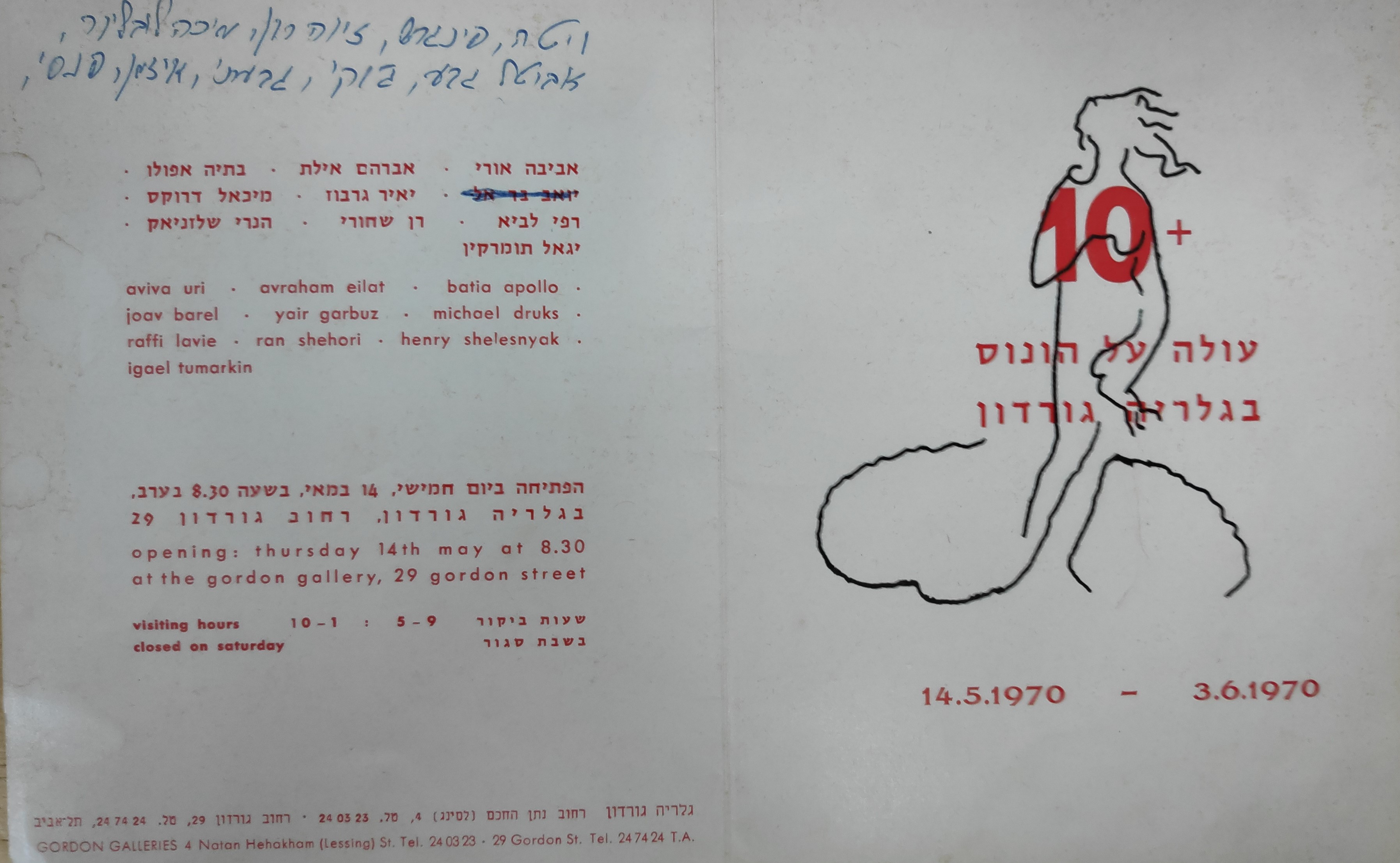 מתוך האוסף של בנו כלב